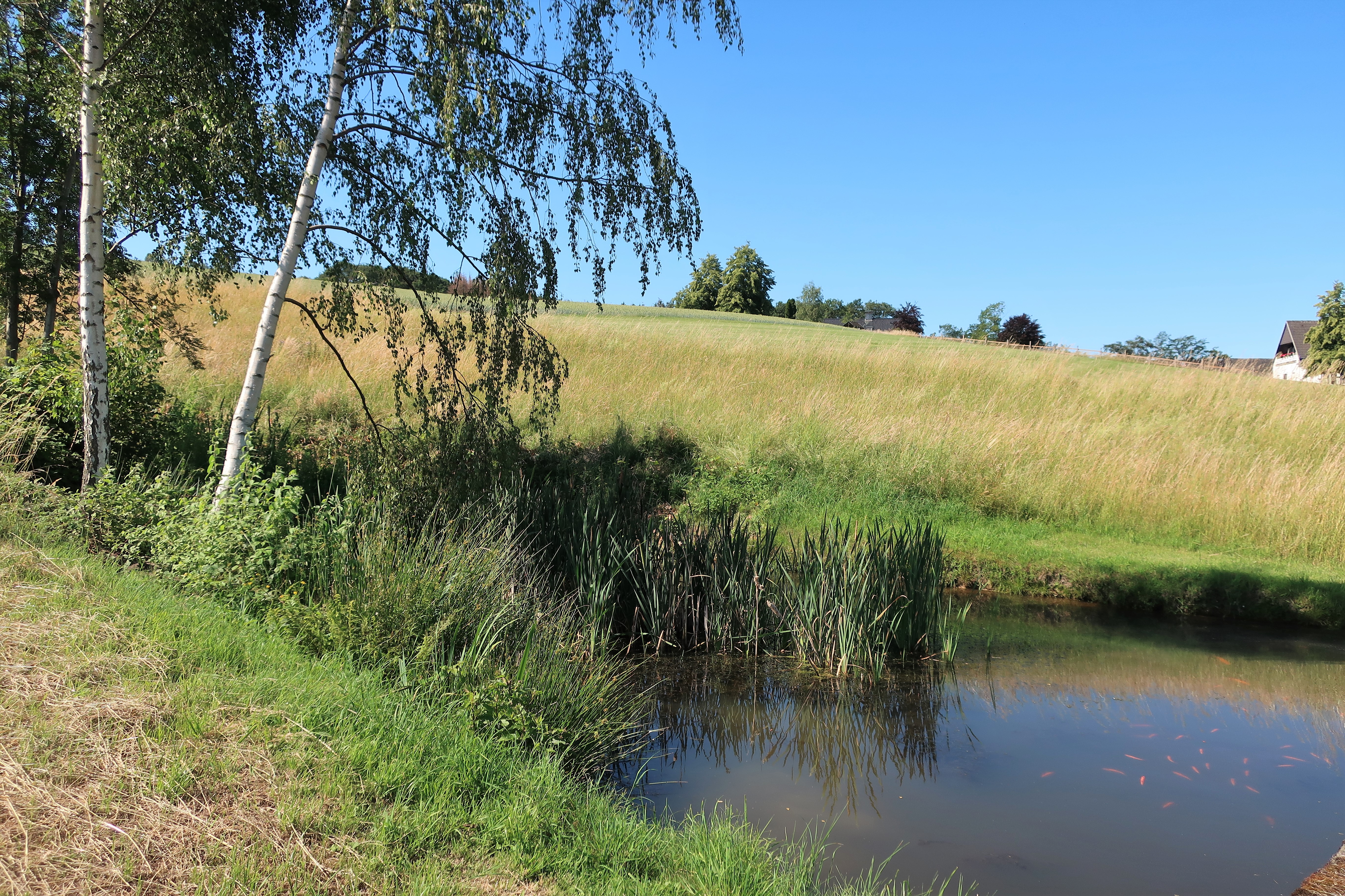 Geschützter Landschaftsbestandteil 1.4.2.69 „Feuchtgebiet Kattenohl“ in Hagen, an der Straße nach Endte. Es handelt sich um eine Wiese mit Teich und gehölzbestandenen Böschungen im Osten von Kattenohl (Foto rechts).